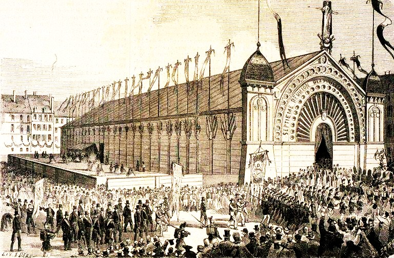 Conservé à la Bibliothèque nationale et universitaire de Strasbourg. Éditeur : s.n (S.l) Date d'édition : 1863 Sujet : Strasbourg Gravure format : 18,5 x 27,1 cm